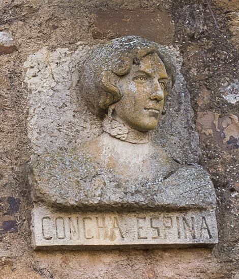 Placa dedicada a la escritora cántabra Concha Espina en la Plaza con mismo nombre de Castrillo de los Polvazares (León; España)